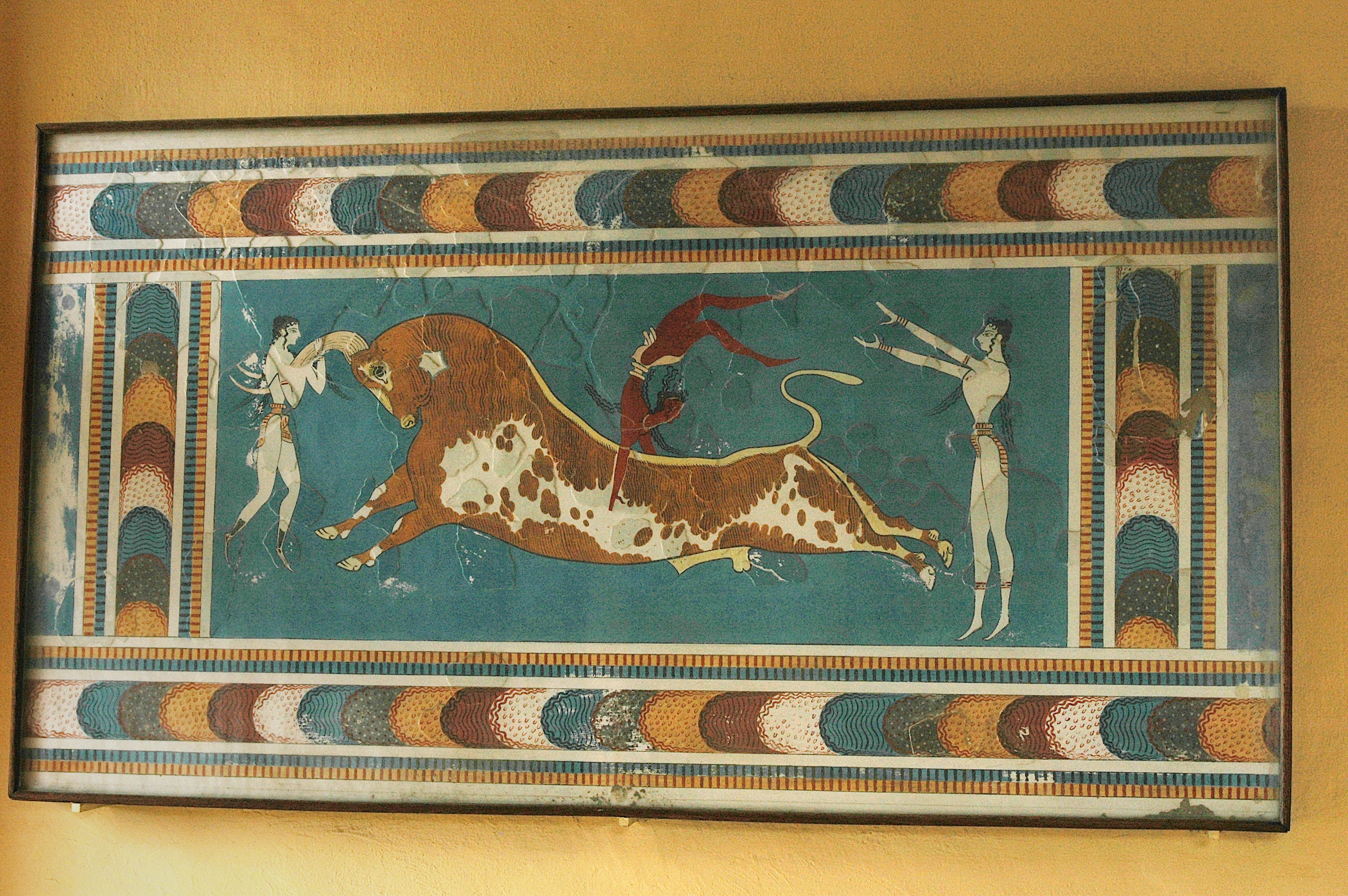 Knossos, fresque au taureau. Photo prise par Harrieta171 le 28/01/06